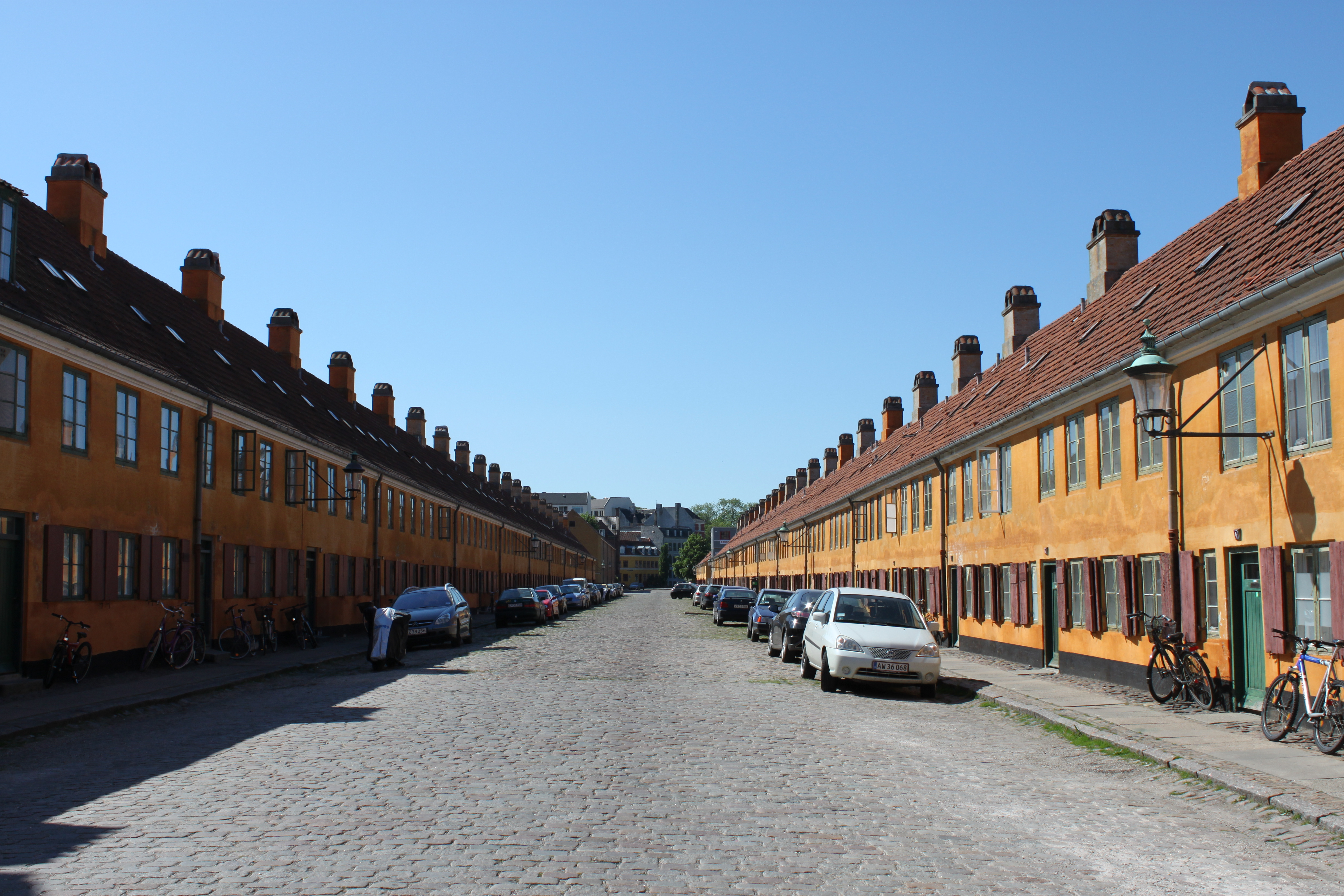 Nyboder in Copenhagen, Denmark